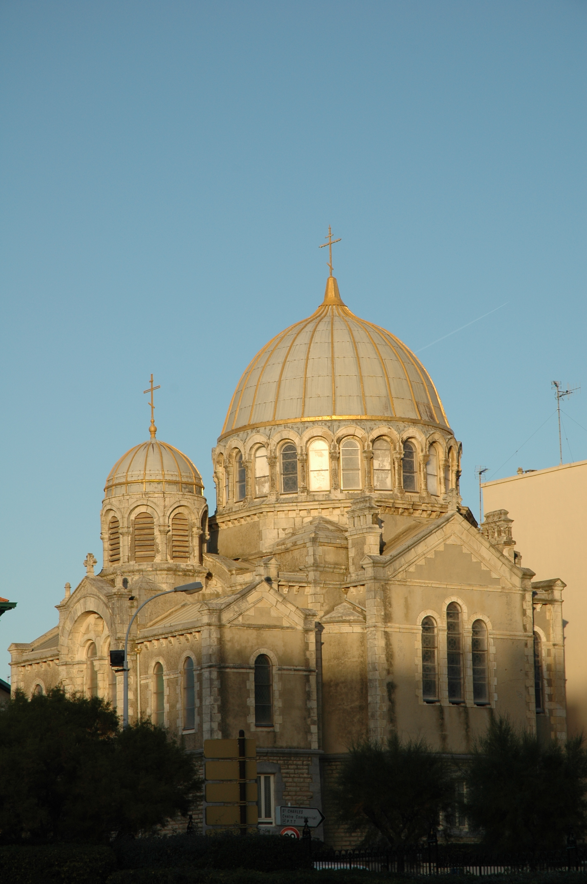 Biarritz, l'église orthodoxe